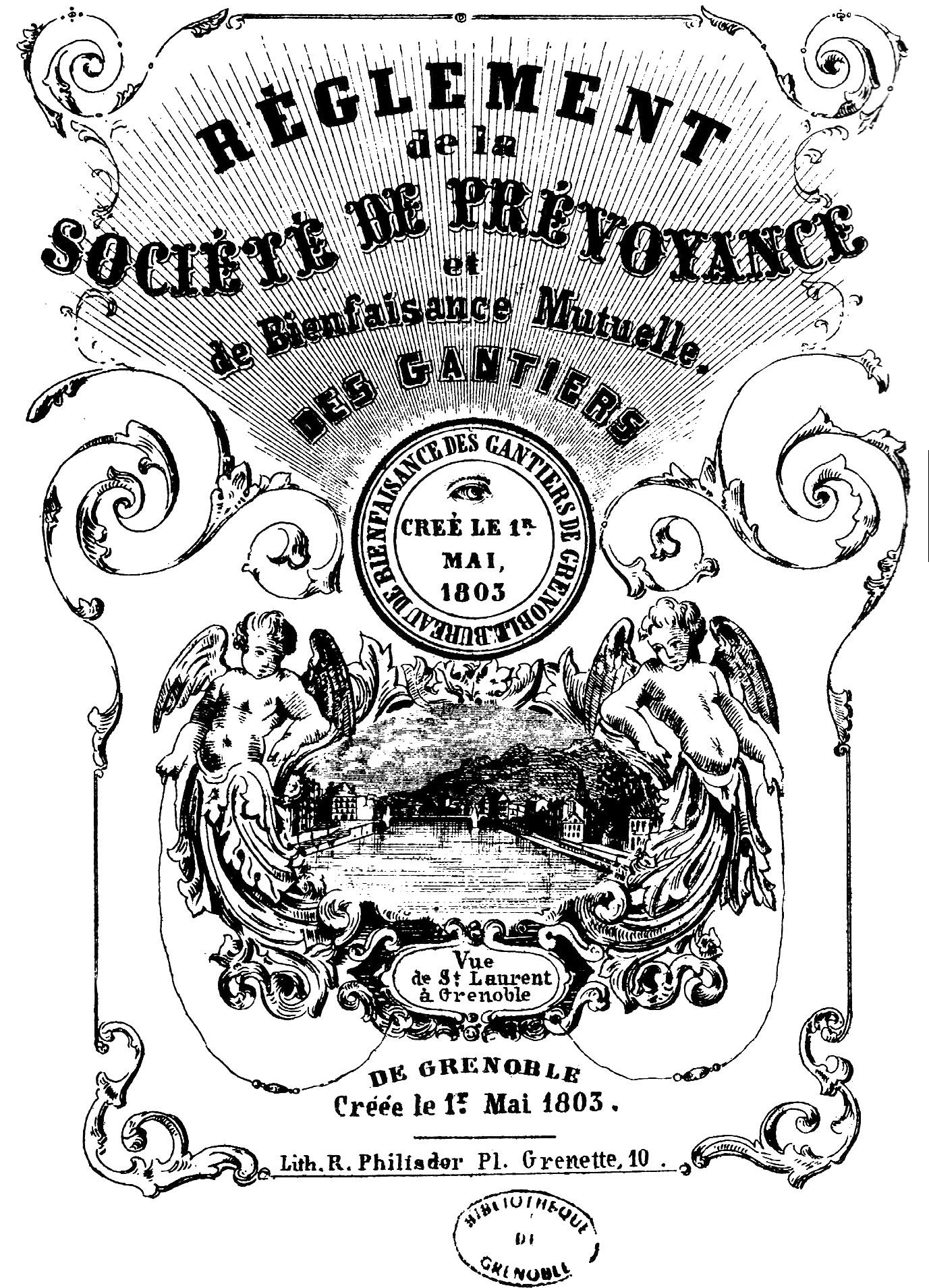 Création le 1er mai 1803 de la première société de prévoyance en France, celle des ouvriers gantiers grenoblois.